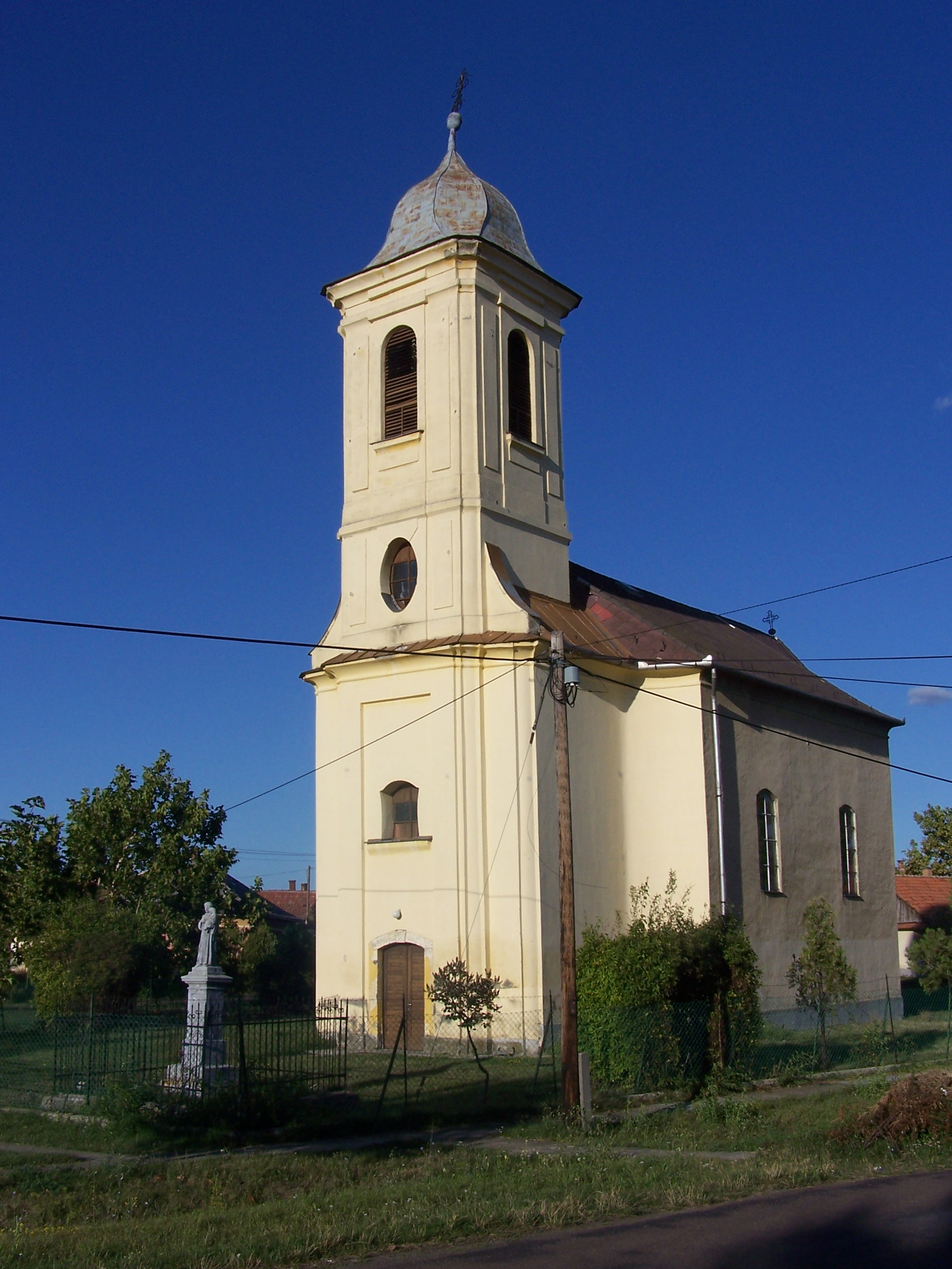 R. k. templom (Szent István király) (Tarnabod, Kossuth tér) This is a photo of a monument in Hungary, Identifier: 5861